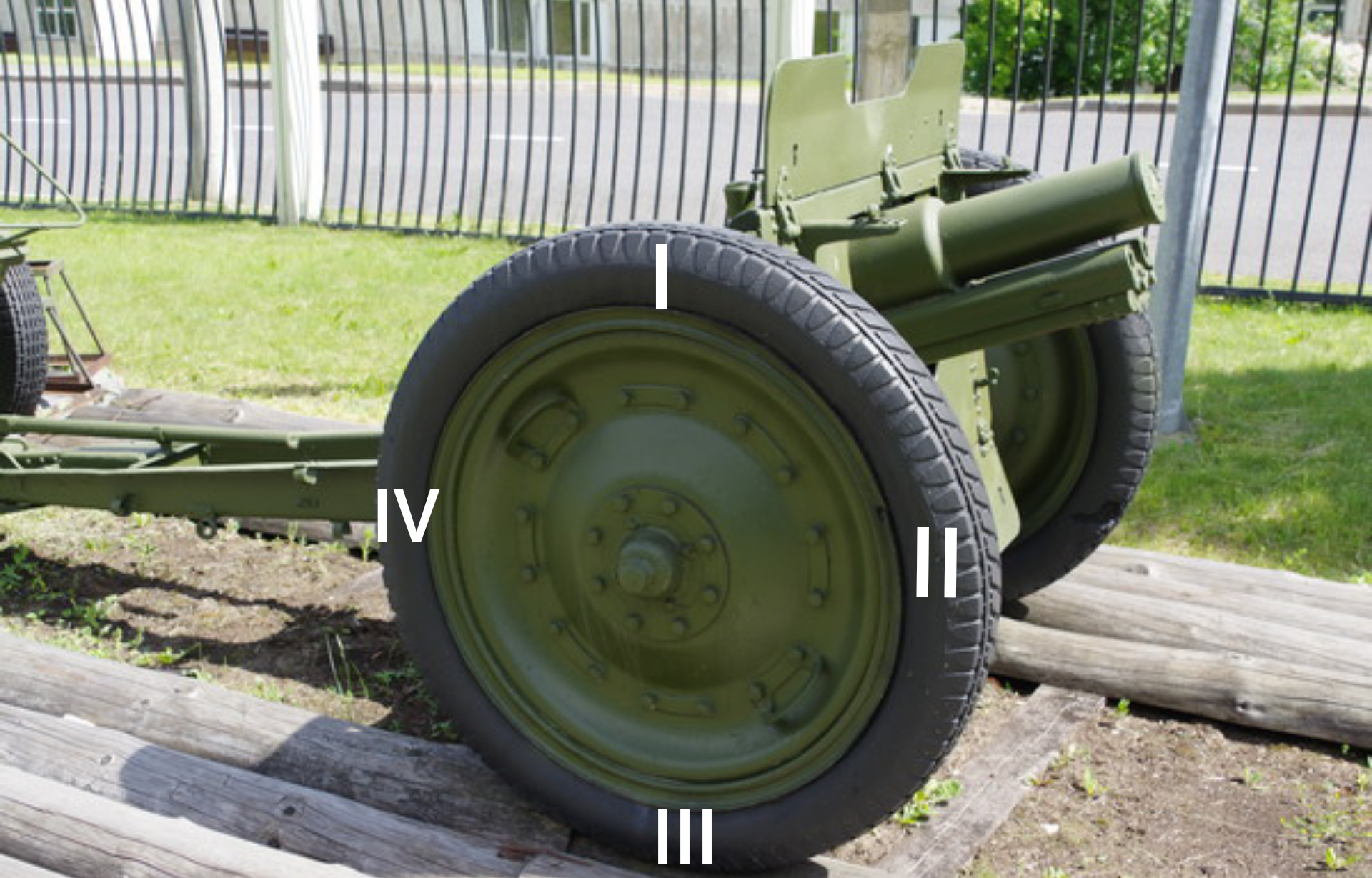 Пушка полковая